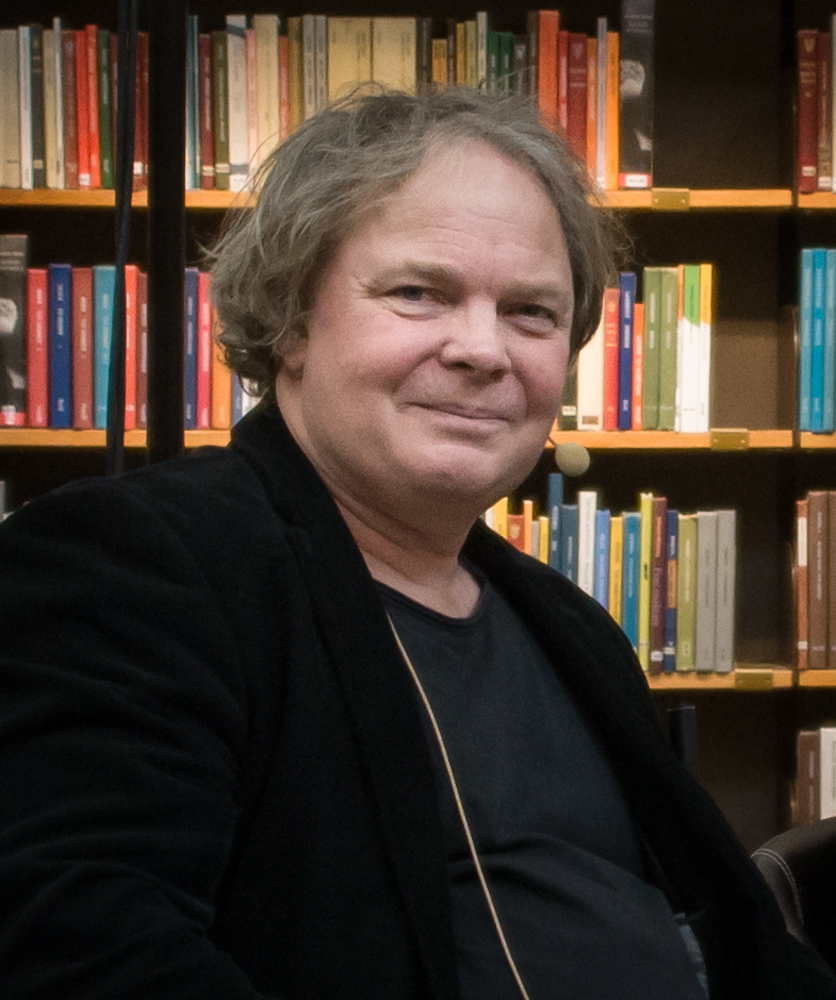 Magnus William-Olsson på Poesimässan på Stockholms Stadsbibliotek den 23 mars 2018.